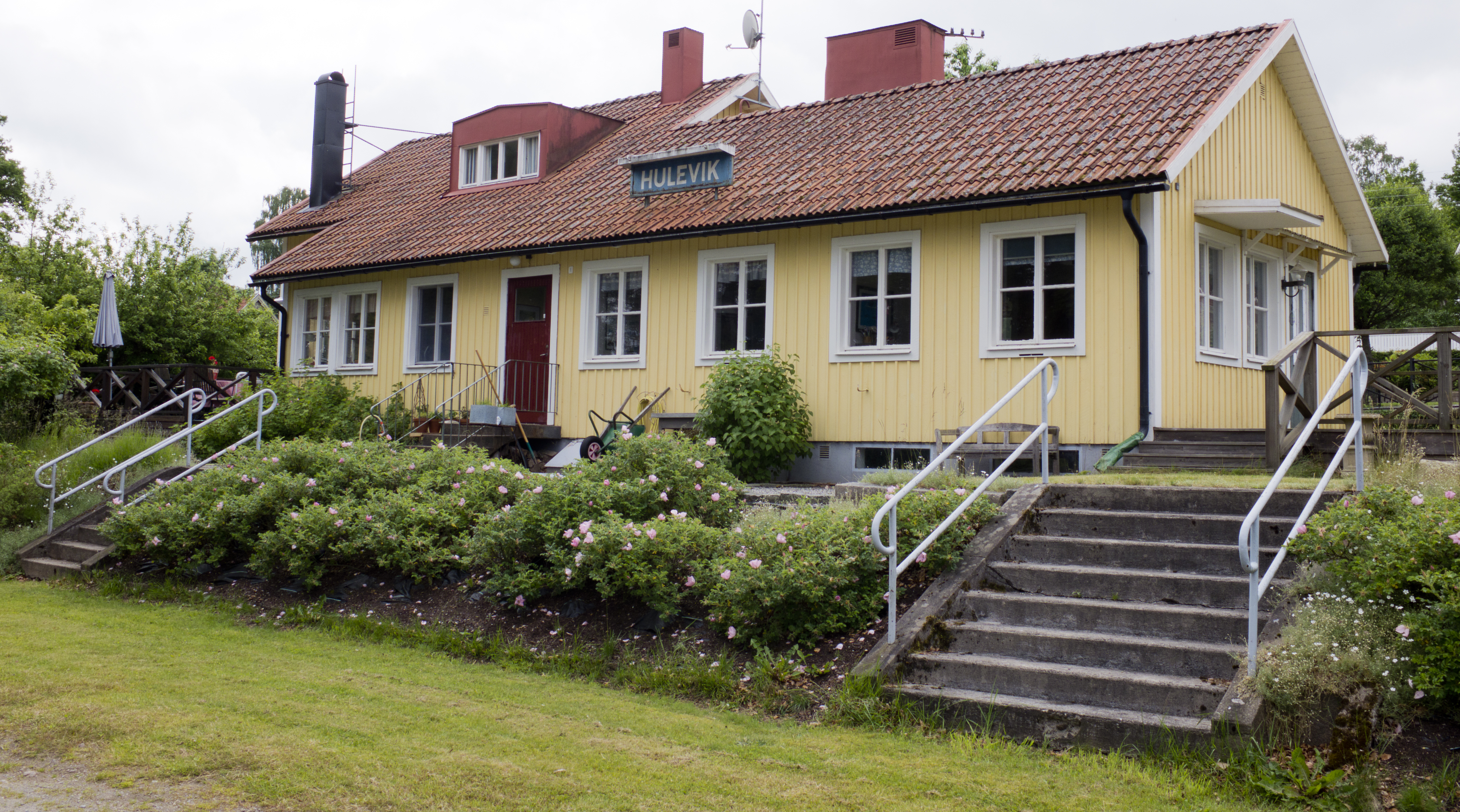 Huleviks hållplats på Karlshamn–Vislanda Järnväg. Byggnaden som användes av järnvägen är numera (2015) i privat ägo.